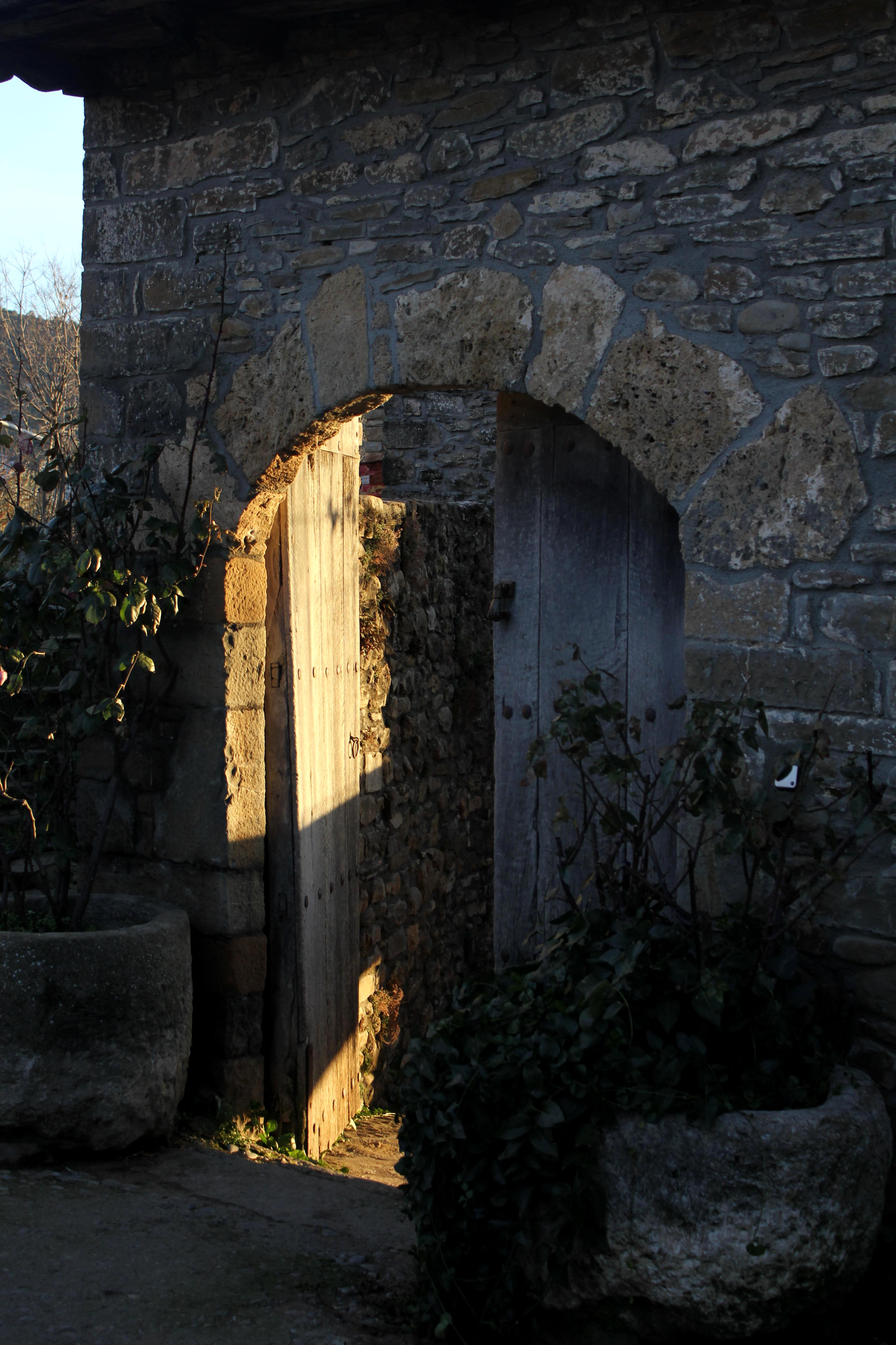 Aragonés: Puerta de l'atrio de Casa Fantoba en o Lumo de Ranyín (A Fueva).